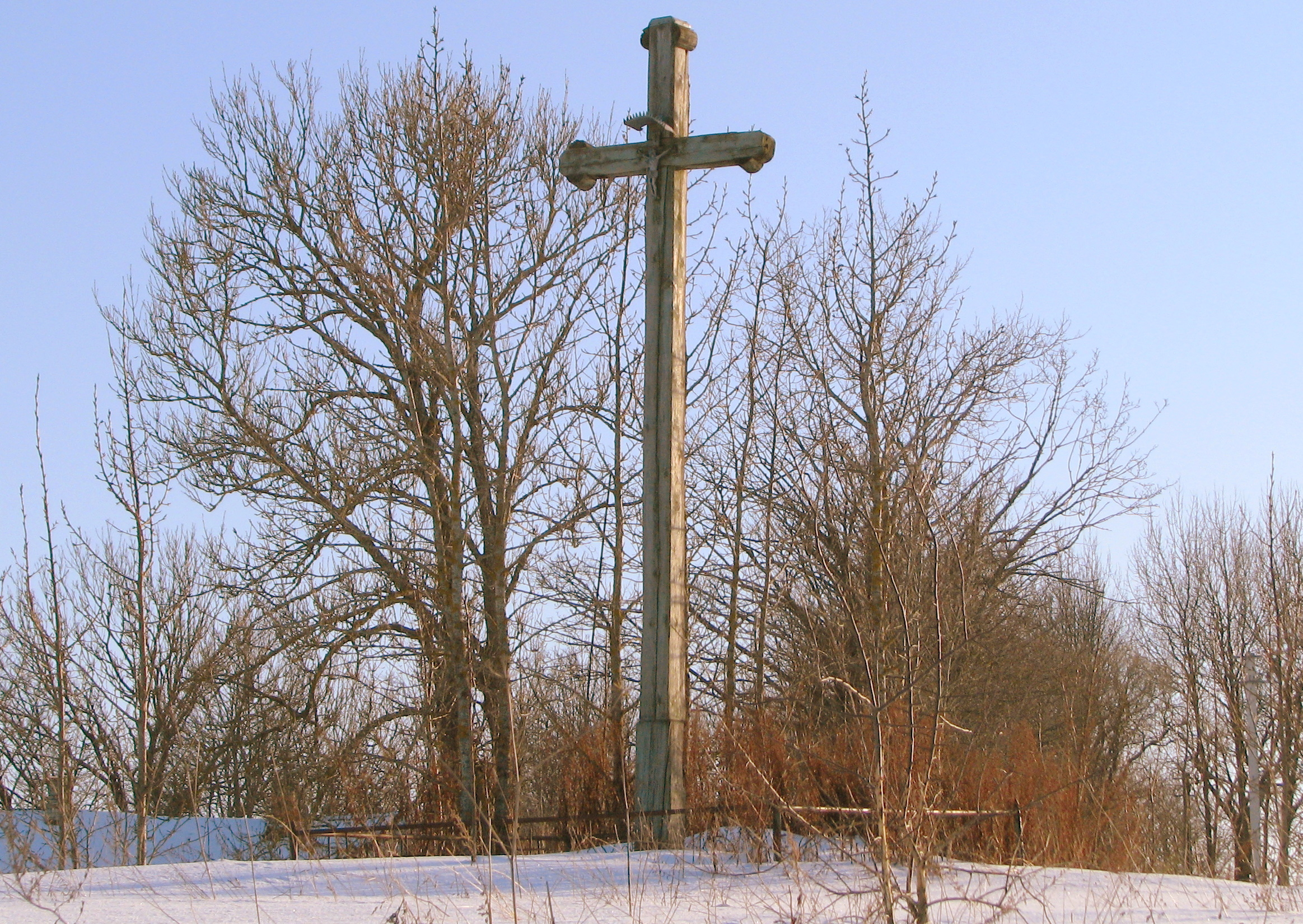 Akmenių kaimo kryžius